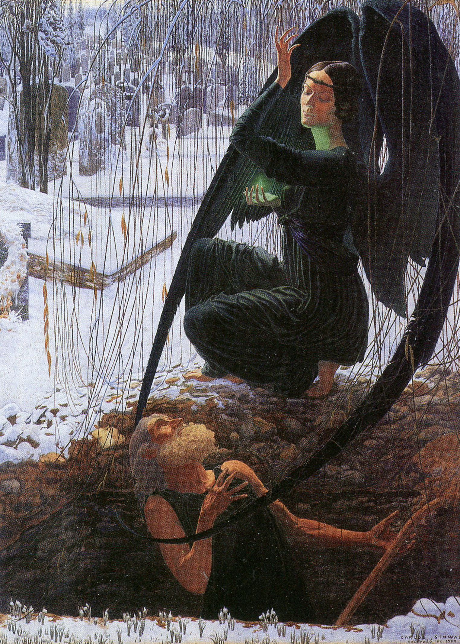 Смерть гробокопателя.